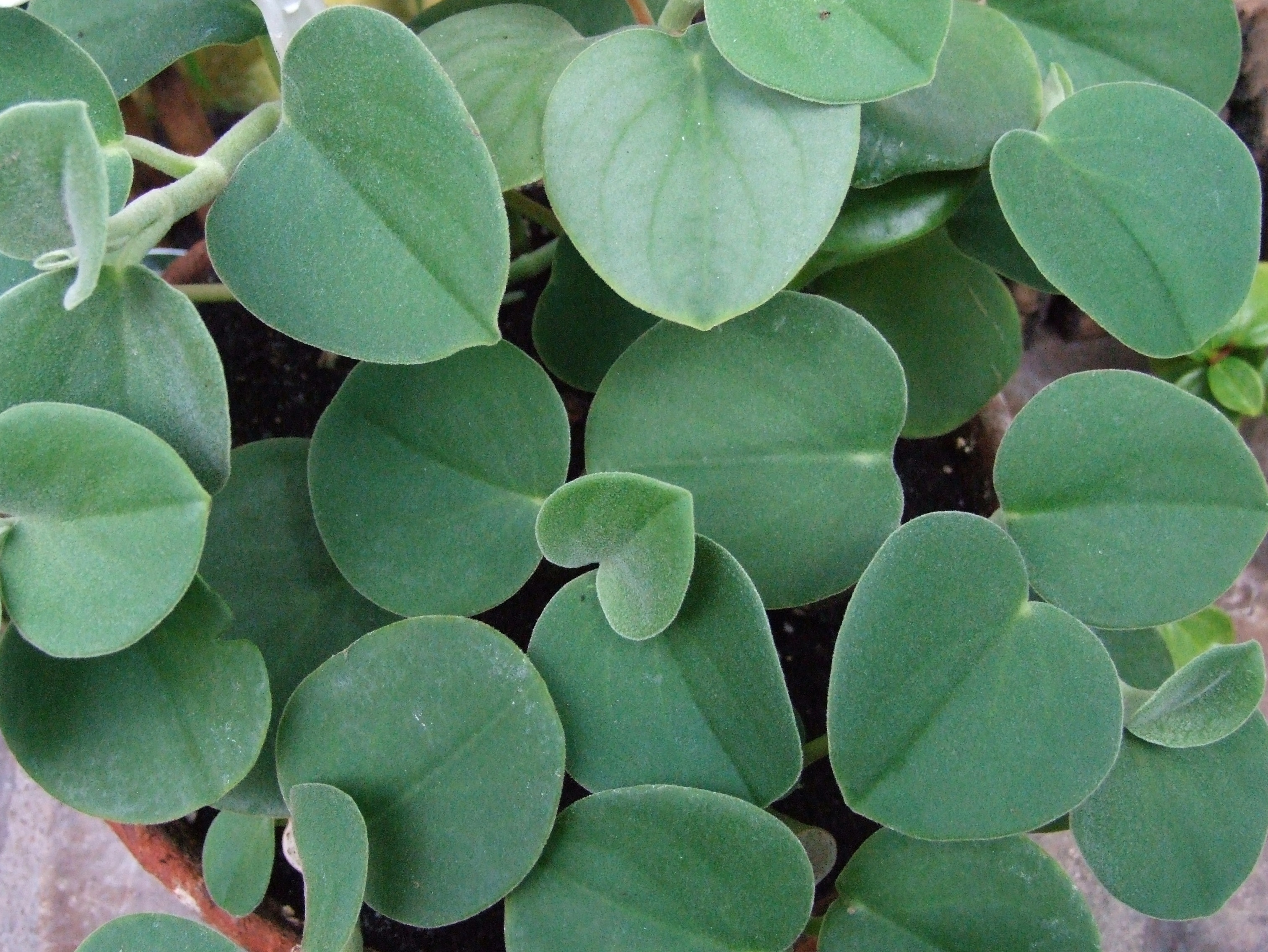 Peperomia incana